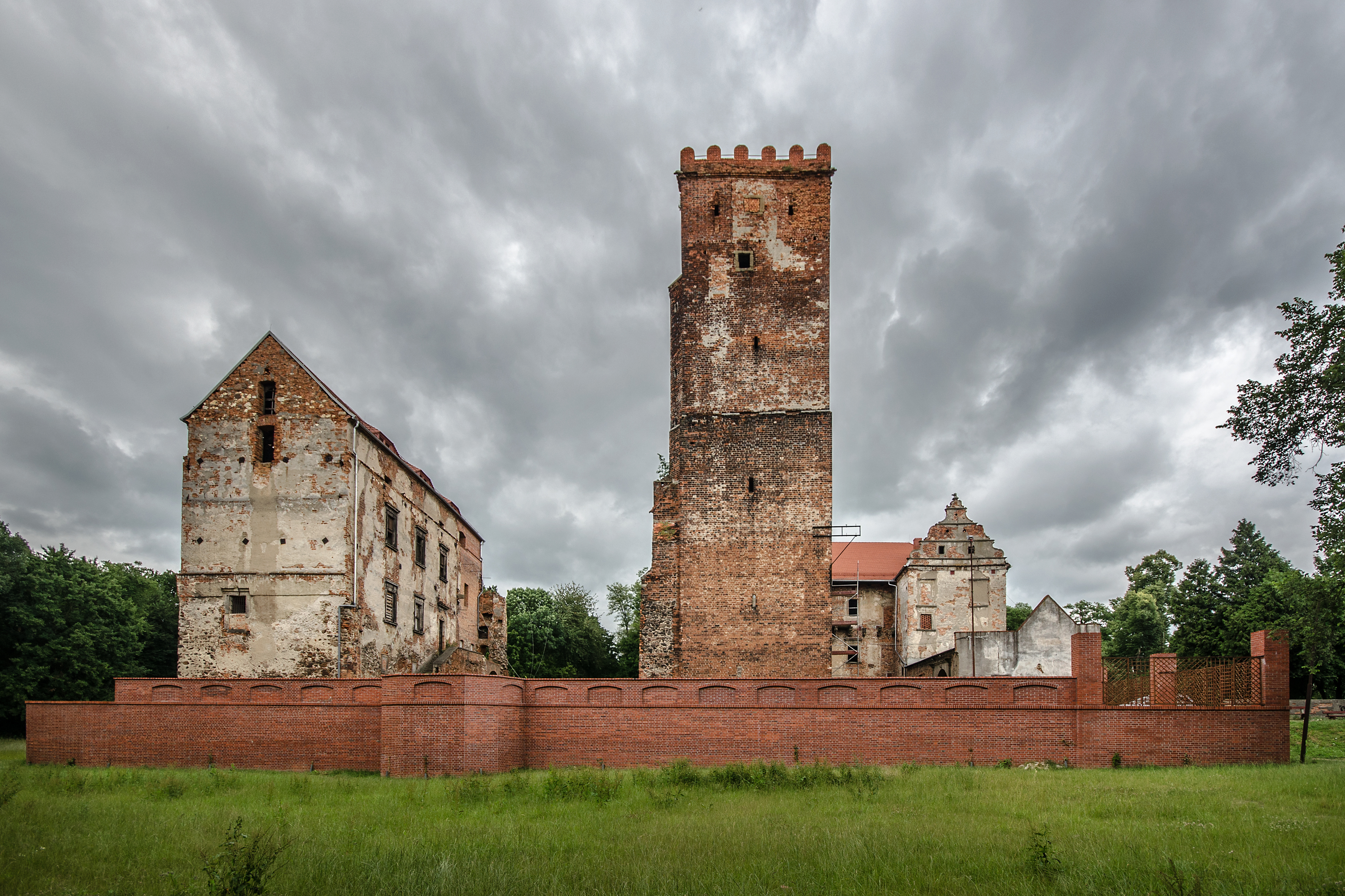 Prochowice, zamek, tzw. Stary, 1540, 1637